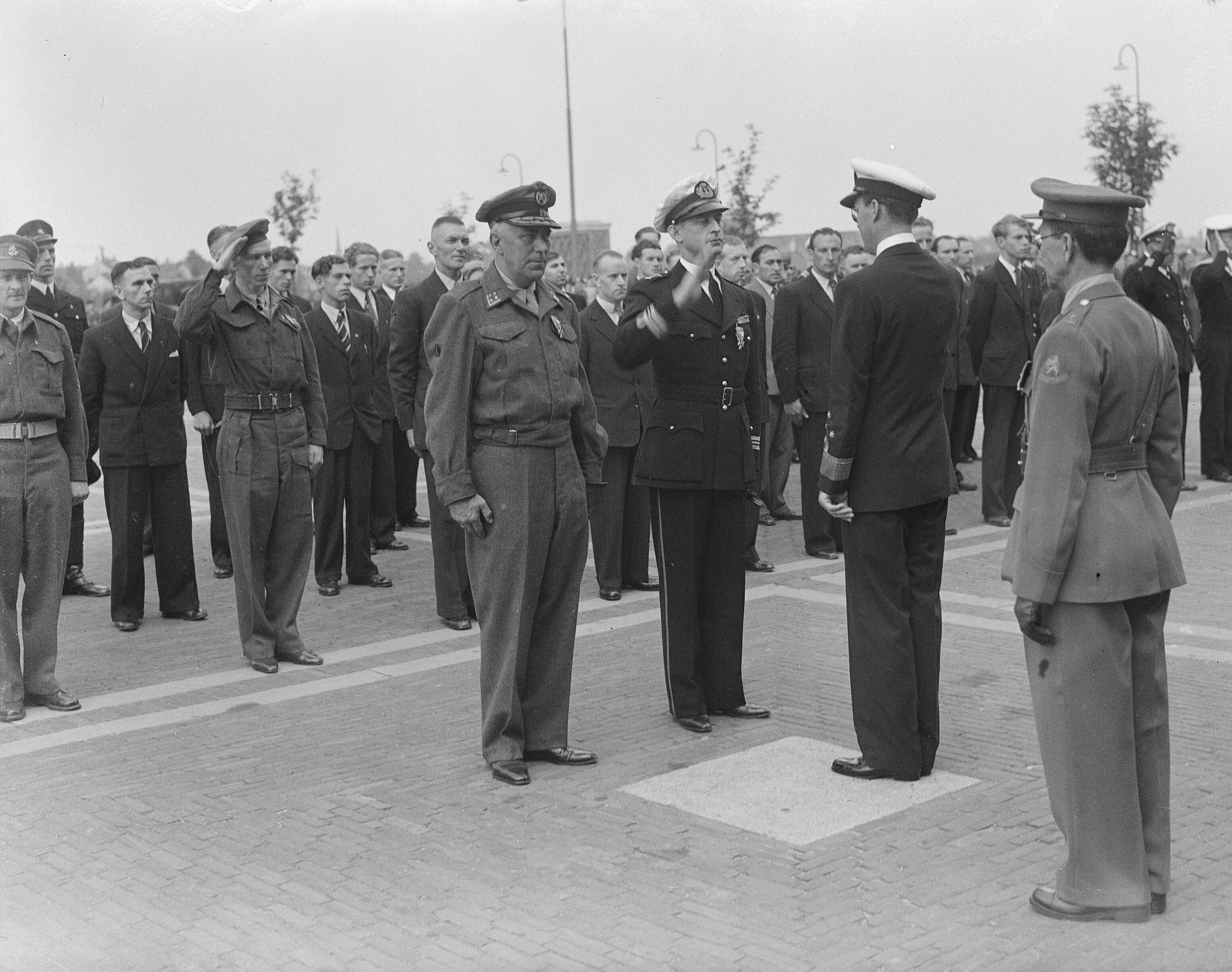 Collectie / Archief : Fotocollectie Anefo Reportage / Serie : [ onbekend ] Beschrijving : Uitreiking Militaire Willems-Orde door prins Bernhard aan generaal-majoor der Infanterie van het KNIL S. de Waal (links) en majoor der Mariniers C.G. Lems in de mariniershaven Rotterdam. Datum : 13 september 1949 Locatie : Rotterdam, Zuid-Holland Trefwoorden : marine, militairen, officieren, onderscheidingen Persoonsnaam : Bernhard, prins, Lems, Cornelis Gerardus, Waal, Simon de Instellingsnaam : MWO Fotograaf : Winterbergen, […] / Anefo Auteursrechthebbende : Nationaal Archief Materiaalsoort : Glasnegatief Nummer archiefinventaris : bekijk toegang 2.24.01.09 Bestanddeelnummer : 903-6036